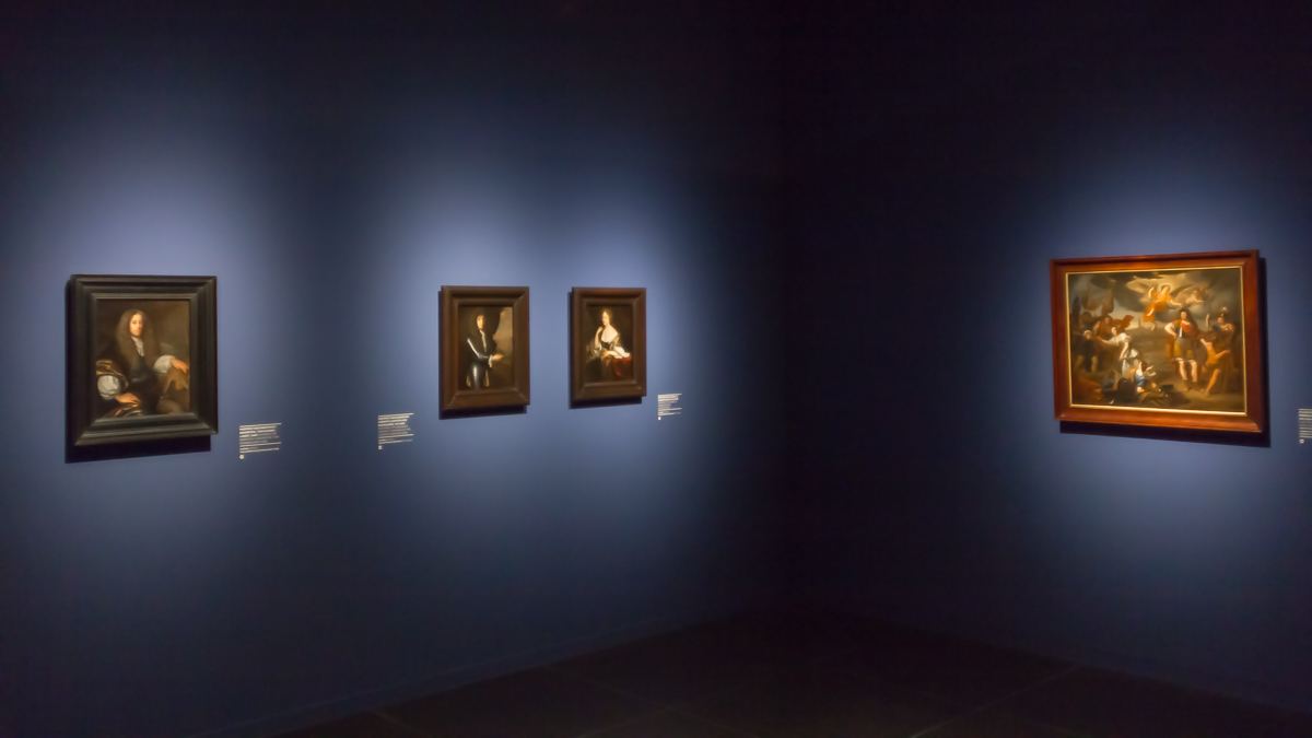 „Schalcken - Gemalte Verführung“ - Ausstellung über das Werk des niederländischen Malers Godefridus Schalcken im Wallraf-Richartz-Museum & Fondation Corboud. 25. September 2015 bis 24. Januar 2016